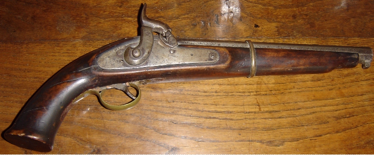 My Picture ( Lax) copie espagnole d'un Pistolet à Capsule